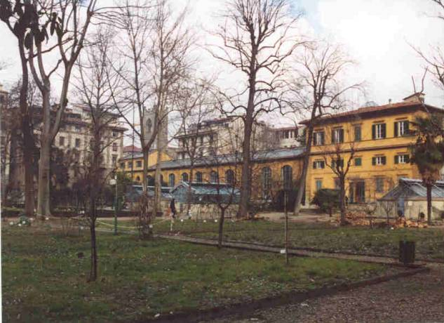 Panoramica del Giardino dei Semplici di Firenze